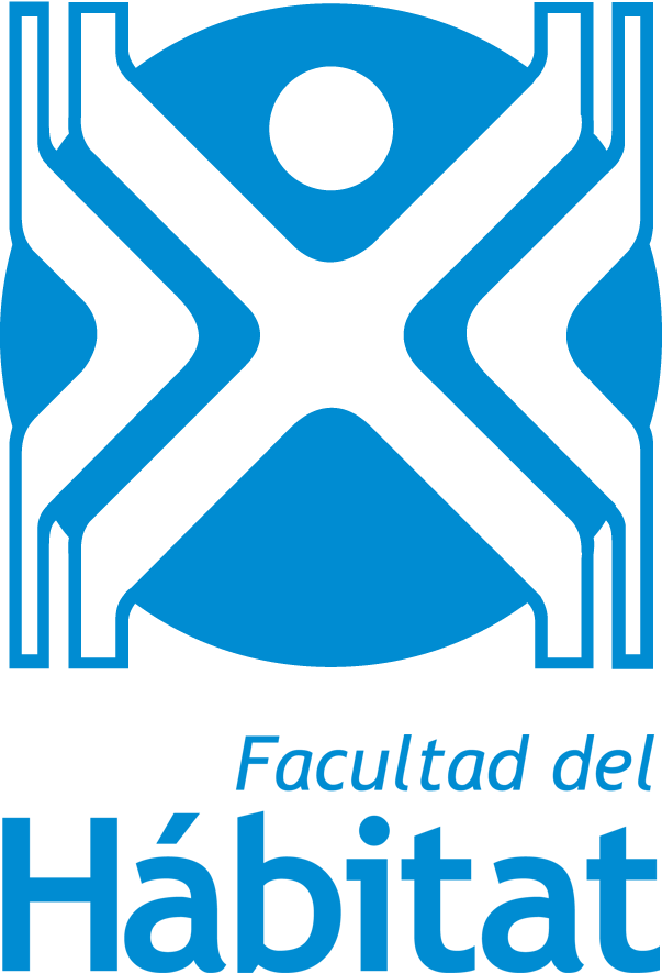 Logo Facultad del Hábitat